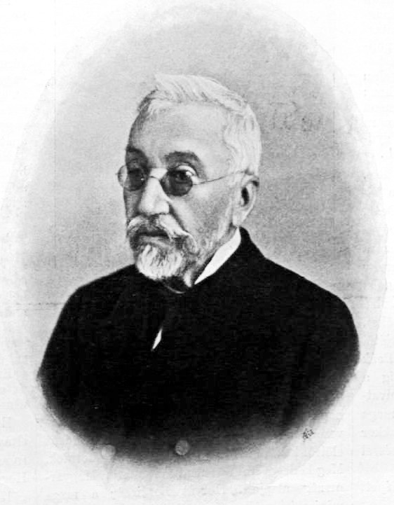 Horvát Boldizsár (1822–1898) író, költő, jogtudós, politikus, miniszter, a Magyar Tudományos Akadémai és a Kisfaludy Társaság tagja. Erdélyi Mór fényképfelvétele